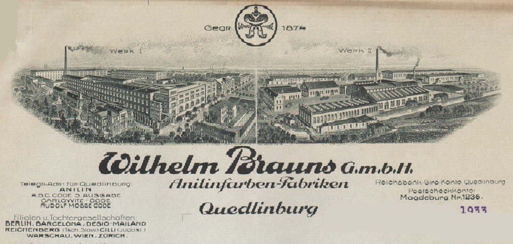 Briefkiopf Wilhelm Brauns ca. 1920